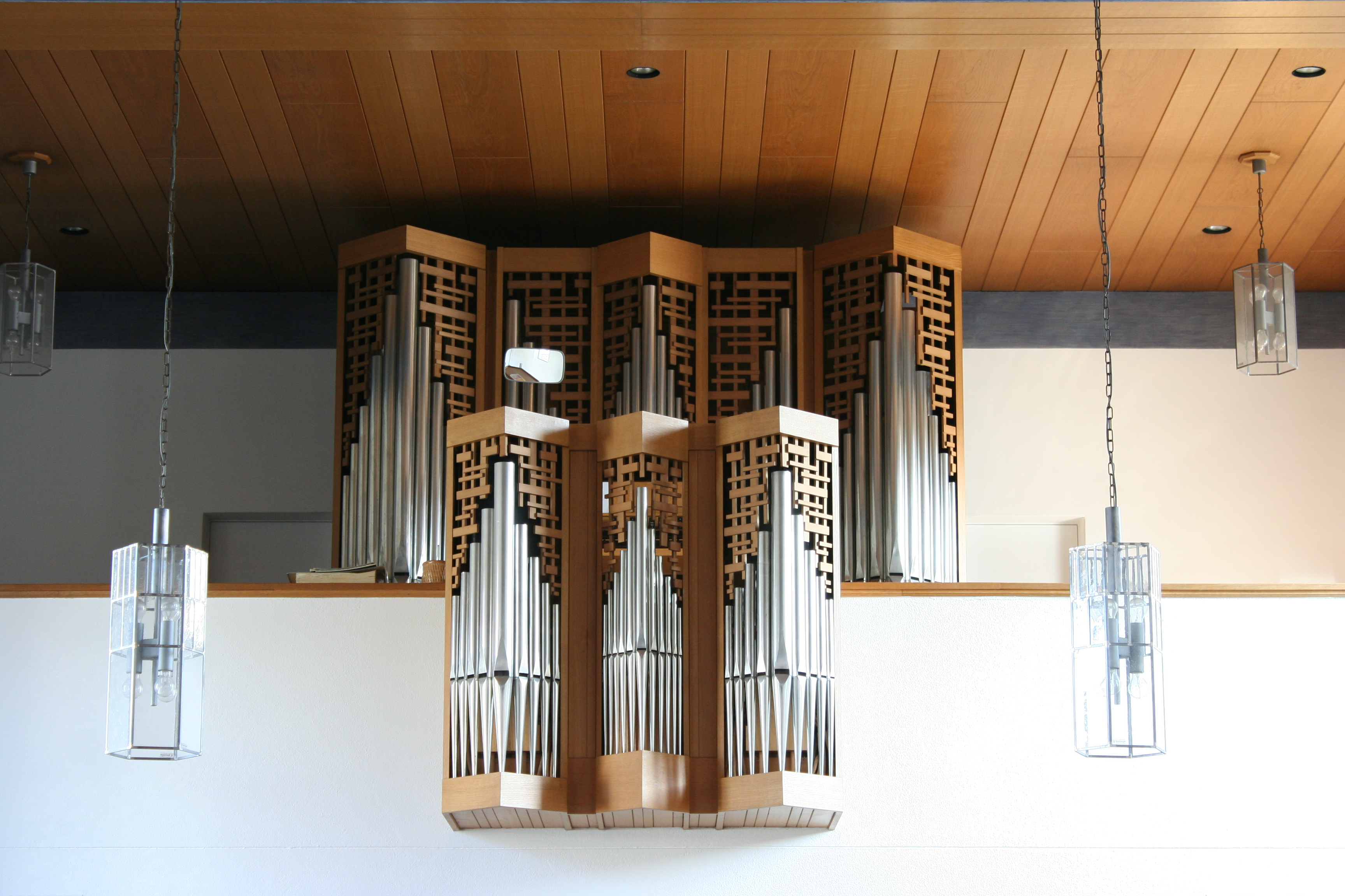 Römisch-katholische Kirche St. Anton Bauma, Späth-Orgel